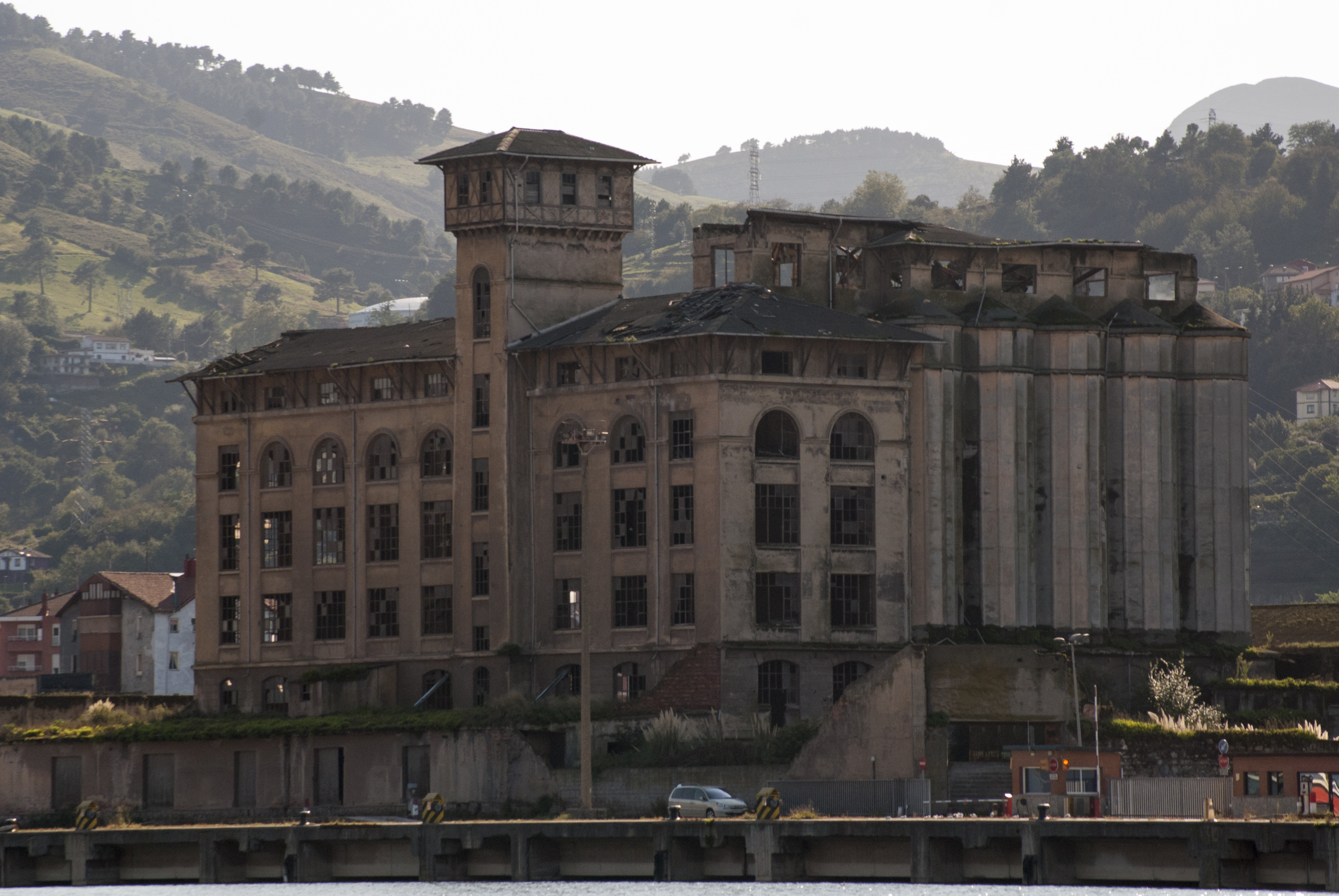 Zorrotzako tailerrak